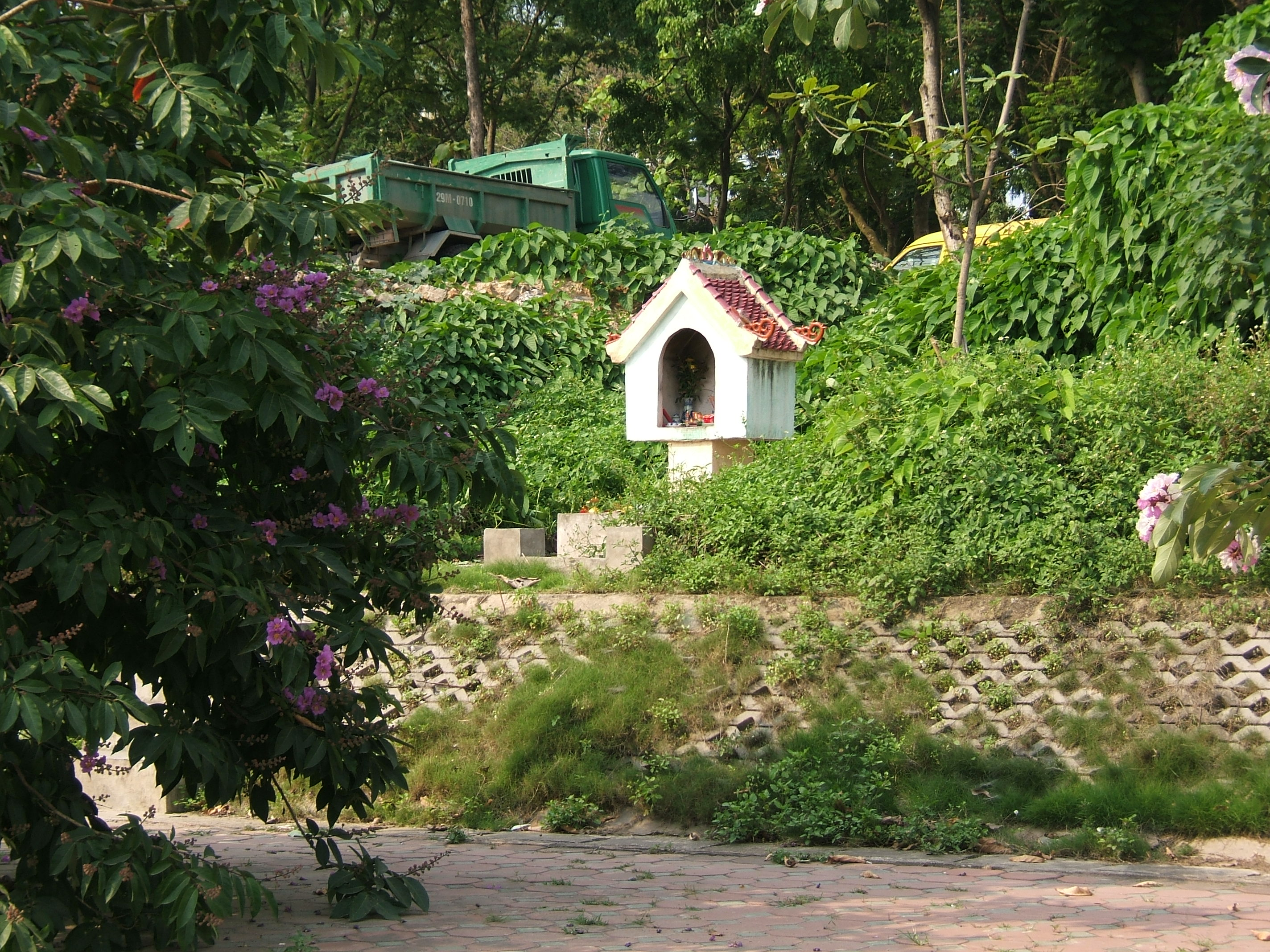 Ngôi miếu được dựng lên sau sự kiện "thánh vật" ở sông Tô Lịch. Nền miếu nằm trên sườn dốc của đường Bưởi, vốn là một đoạn thành Đại La xưa.